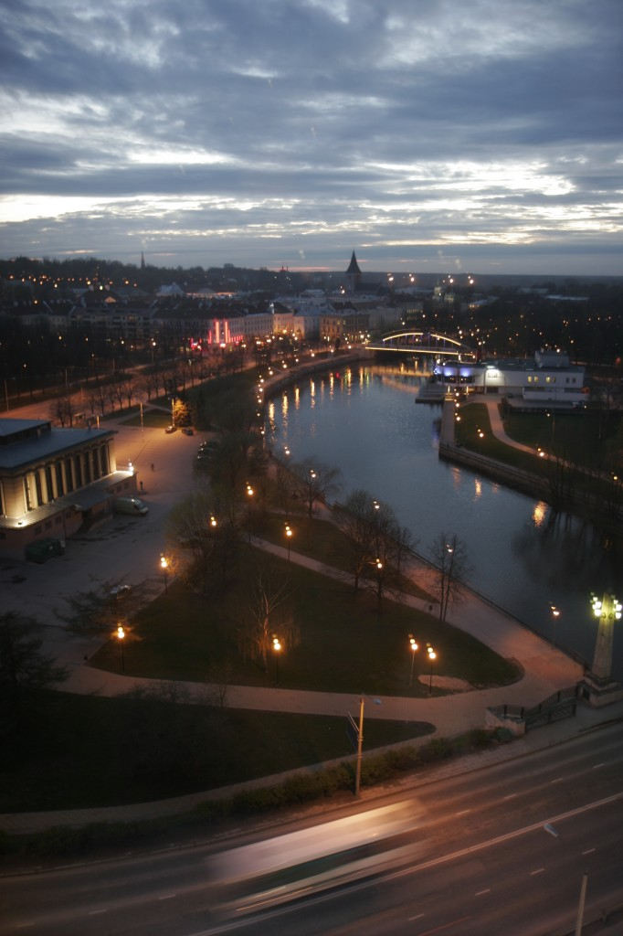 Sunset in Tartu.